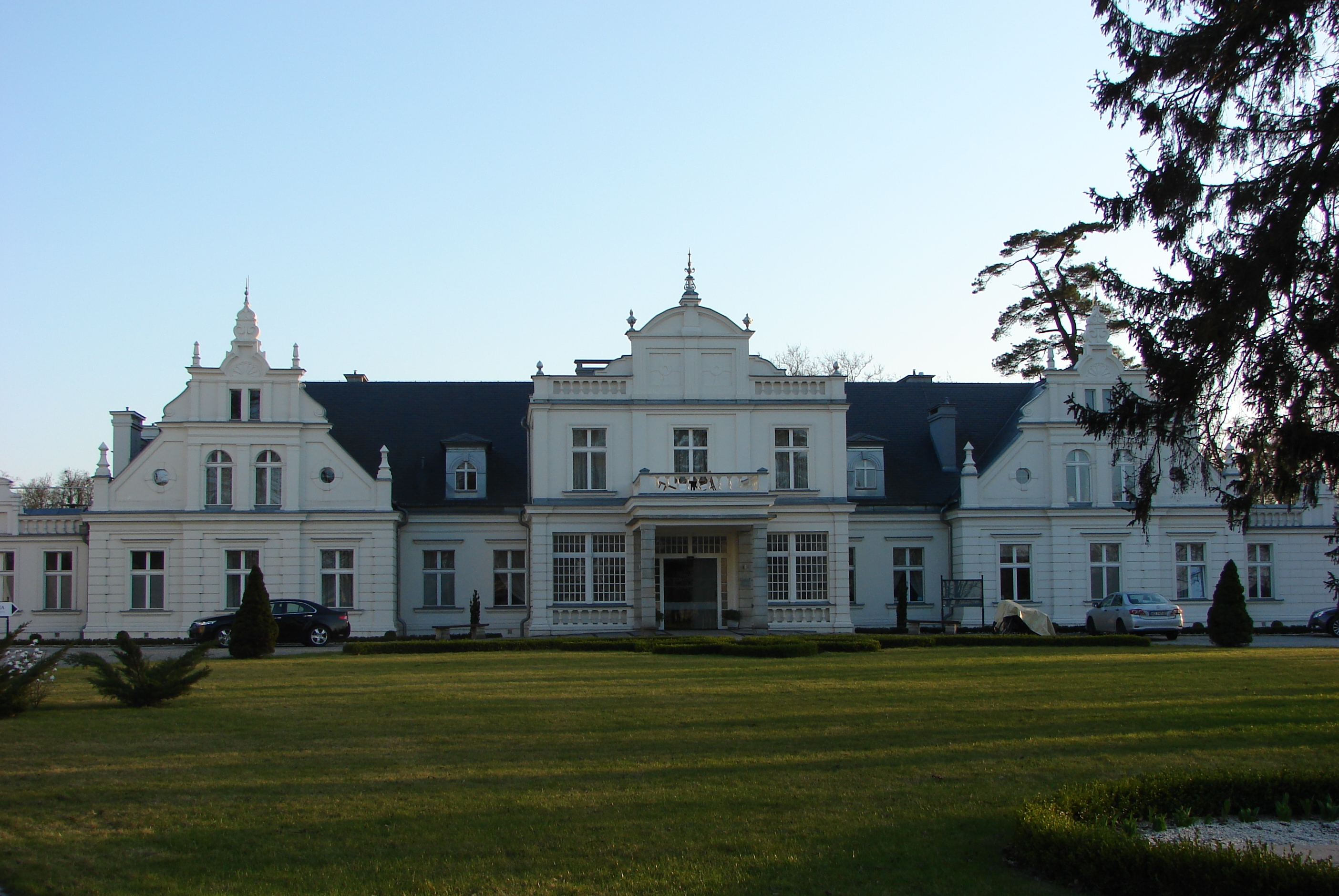 Turzno, Gmina Łysomice. The manor house. Mid-XIX century.